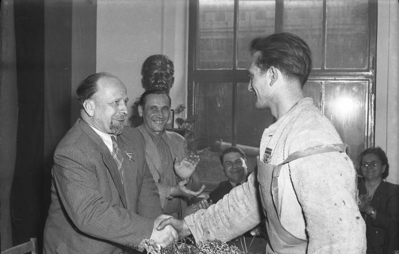 Besuch Walter Ulbricht im Eisenhüttenkombinat Ost Zentralbild/Sturm - 1.5.1952 Der 1. Mai 1952 im Eisenhuettenkombinat Ost. Der Stellvertretende Ministerpraesident Walter Ulbricht weilte am Vorabend des 1. Mai im Eisenhuettenkombinat Ost, um persönlich die Auszeichnung der Aktivisten und Bestarbeiter des Betriebes vorzunehmen. UBz: Der Stellvertretende Ministerpräsident Walter Ulbricht zeichnet den Schmelzer Mund als Aktivisten aus. Abgebildete Personen: Ulbricht, Walter: Staatsratsvorsitzender, Erster Sekretär des Zentralkomitees (ZK) der SED, Vorsitzender des Nationalen Verteidigungsrates, DDR